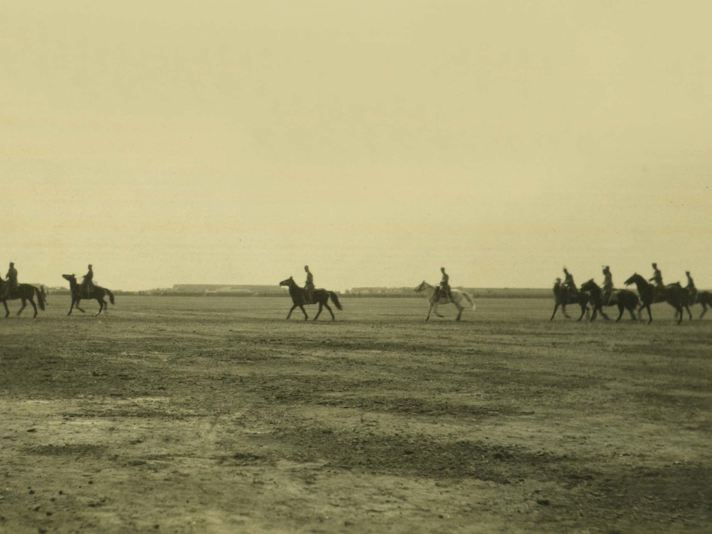 馬で閲兵式に向かう黎元洪と部下の軍官。